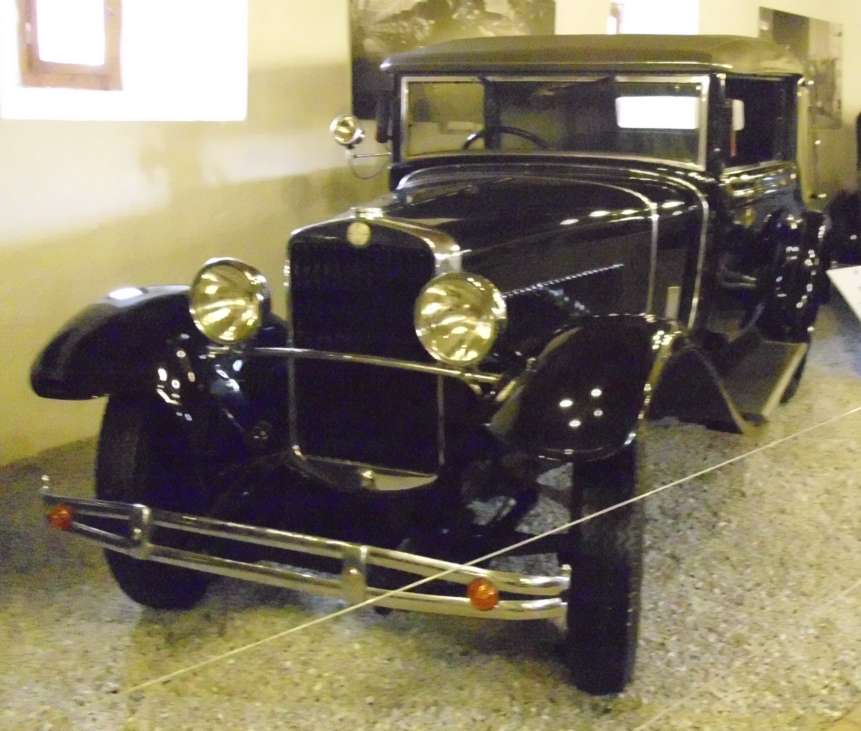 Steyr Typ XX 1929 im Automobilmuseum der Burg Strechau